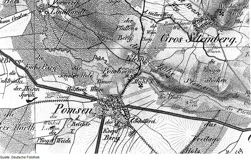 Original image description from the Deutsche Fotothek Parthenstein-Pomßen. Oberreit, Sect. Leipzig, 1836/39